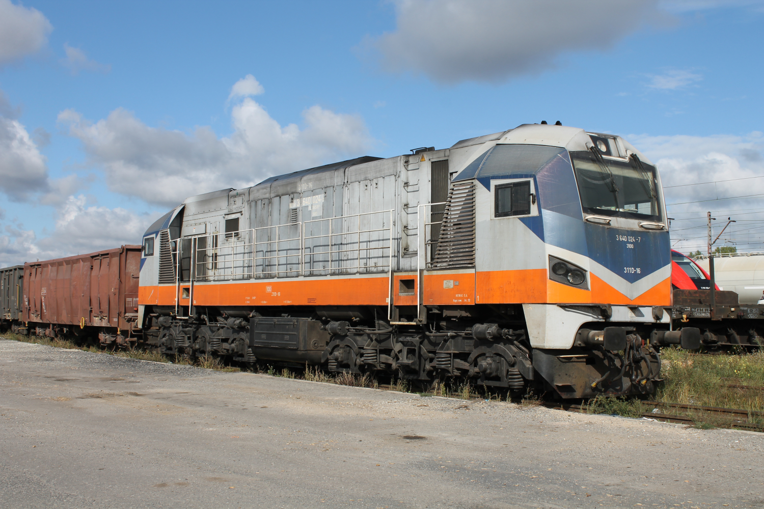 Lokomotywa spalinowa 311D-16 należąca do DB Schenker Rail Polska stoi na bocznicy przy stacji Konin. The making of this document was supported by Wikimedia Polska Association, within Wikigrant no. WG 2015-34.